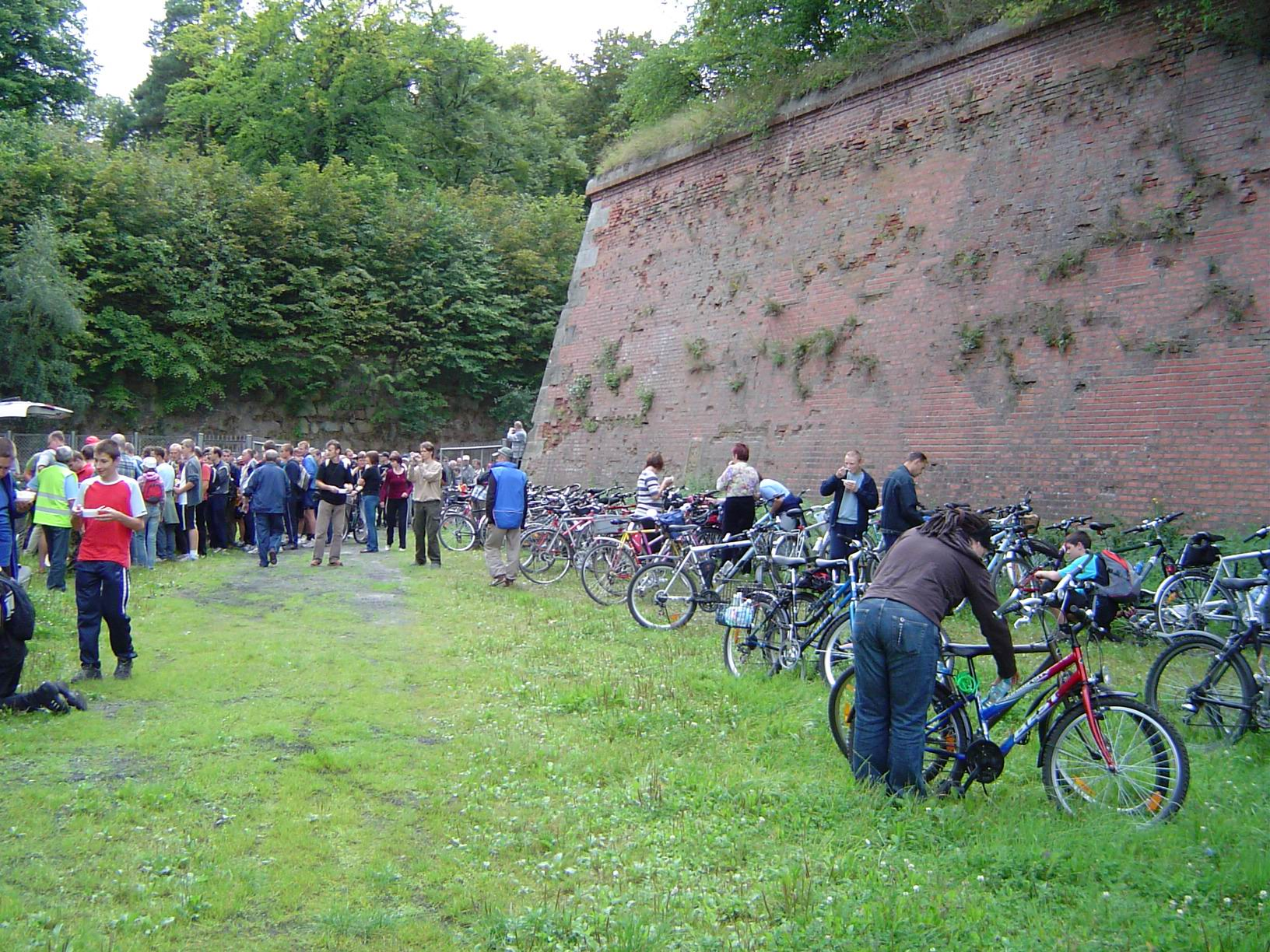 Rajd rowerowy wokół grudziądzkich fortyfikacji "Do Twierdzy de Courbiere'a" otwierający szlak po Twierdzy Grudziądz